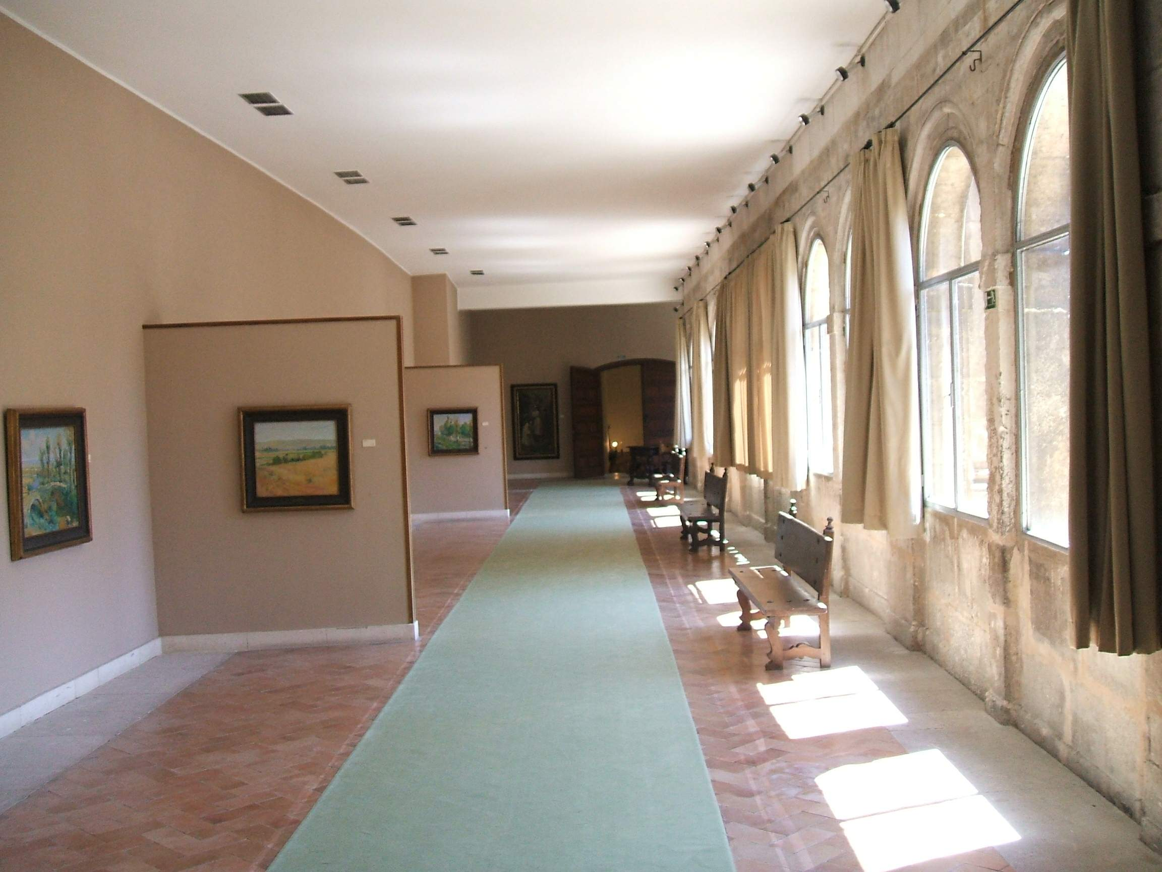 Burgos - Claustro del antiguo Monaterio de San Juan Bautista, hoy habilitado para acoger el Museo de pintura Marceliano Santa María